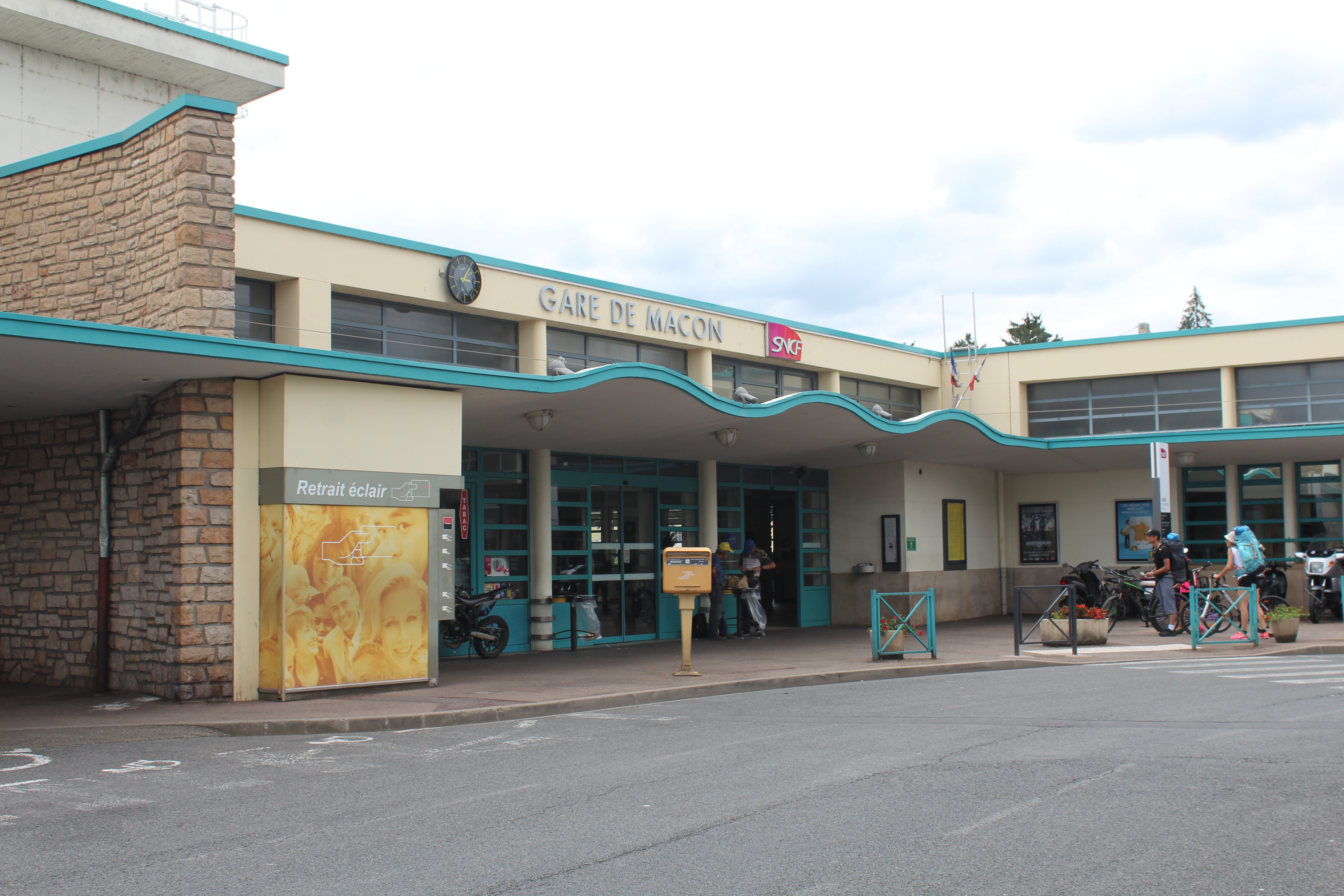 Entrée de la gare de Mâcon-Ville.